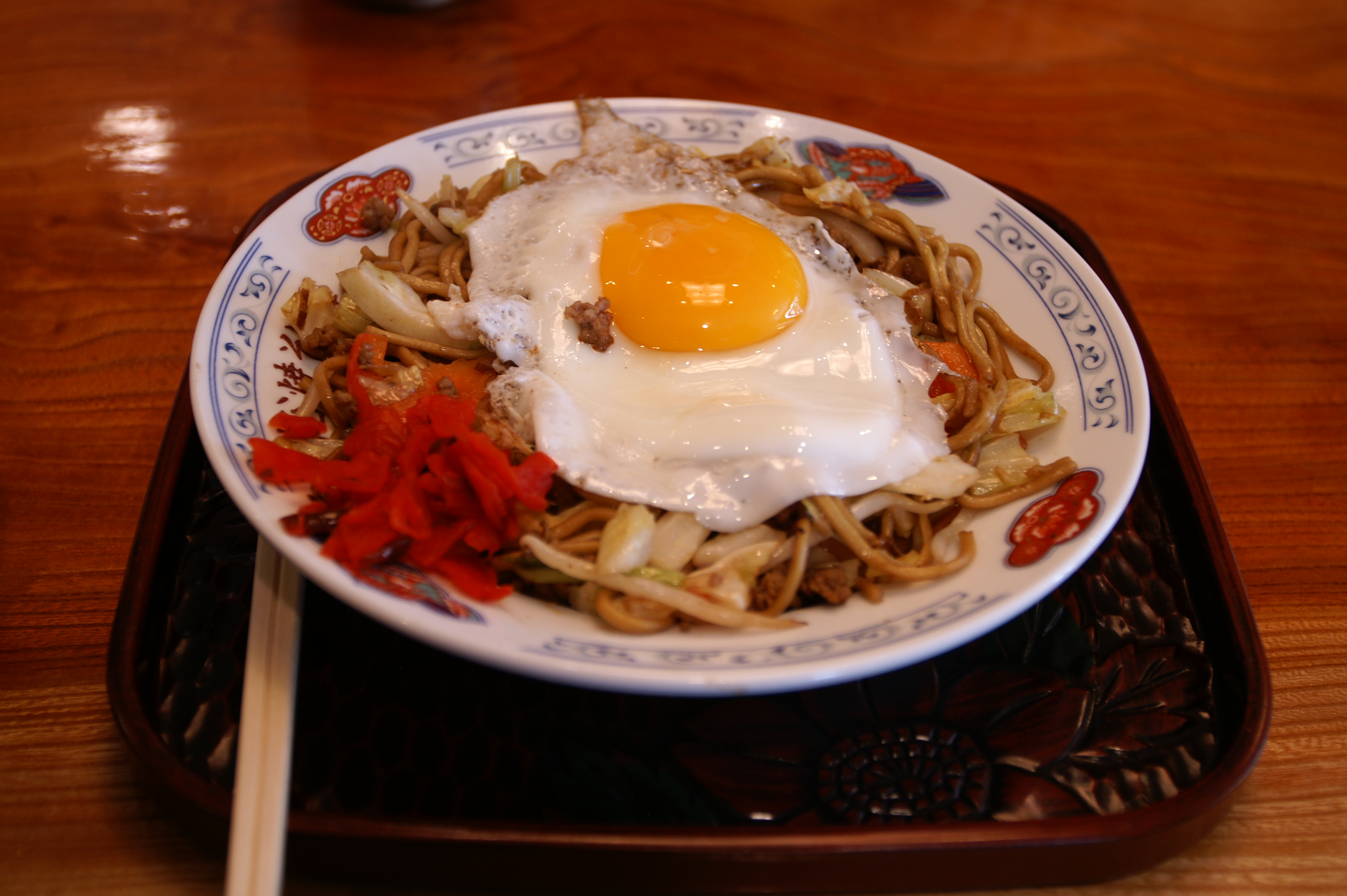 横手焼きそば。 (2008/01/13 Yokote, Akita, JAPAN)